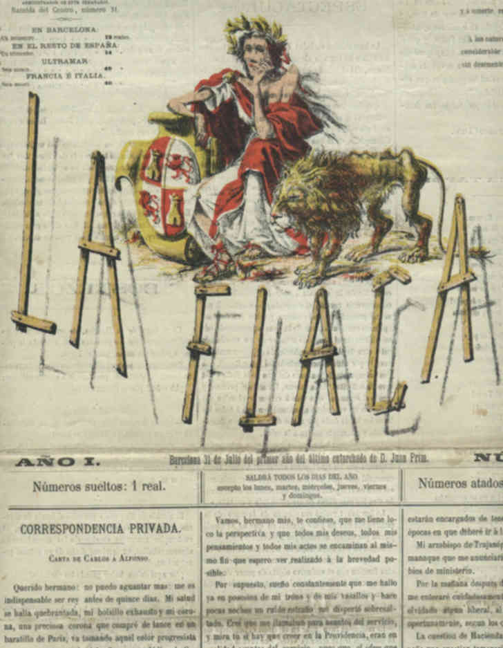 Portada revista satírica La Flaca, Year I.